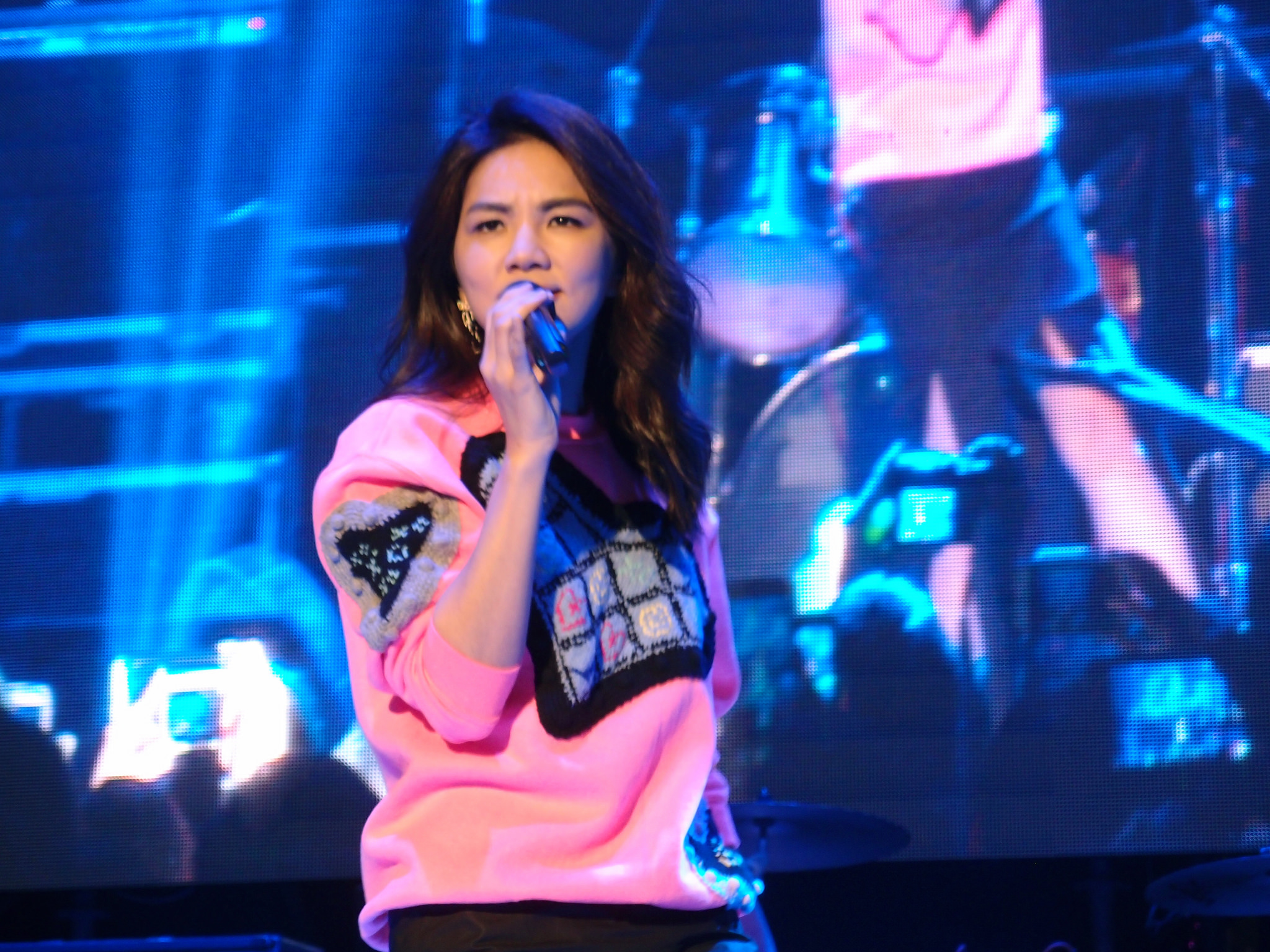 攝於高雄夢時代